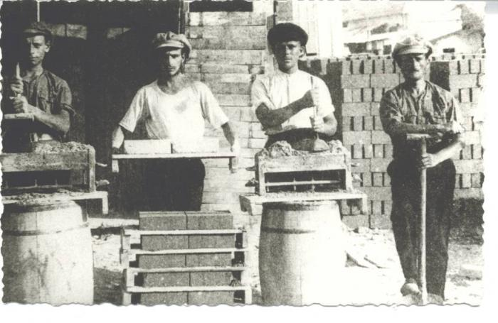 ייצור בלוקים